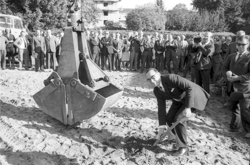 Reinhold Borzikowsky, Staatssekretär im Kultusministerium, gibt das Startsignal für Europas modernste Zahnklinik.